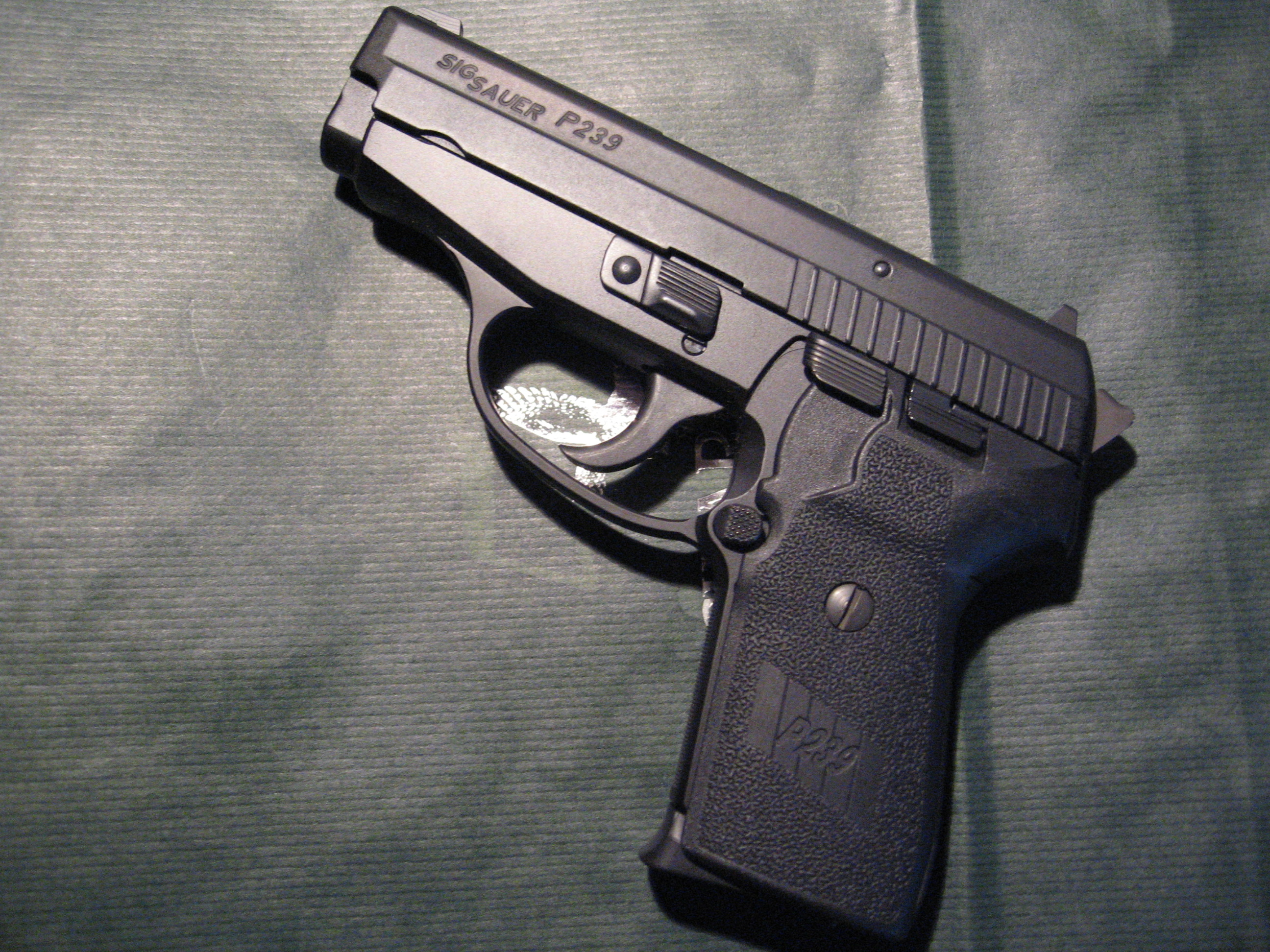 Polavtomatska pištola Sig Sauer, model 239, kaliber 9 mm Para, primerna za usmrtilni strel divjadi.